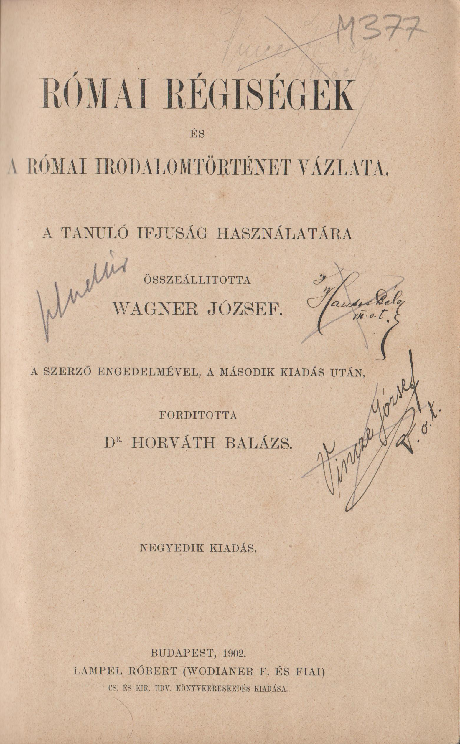 Az adott mű címlapja.